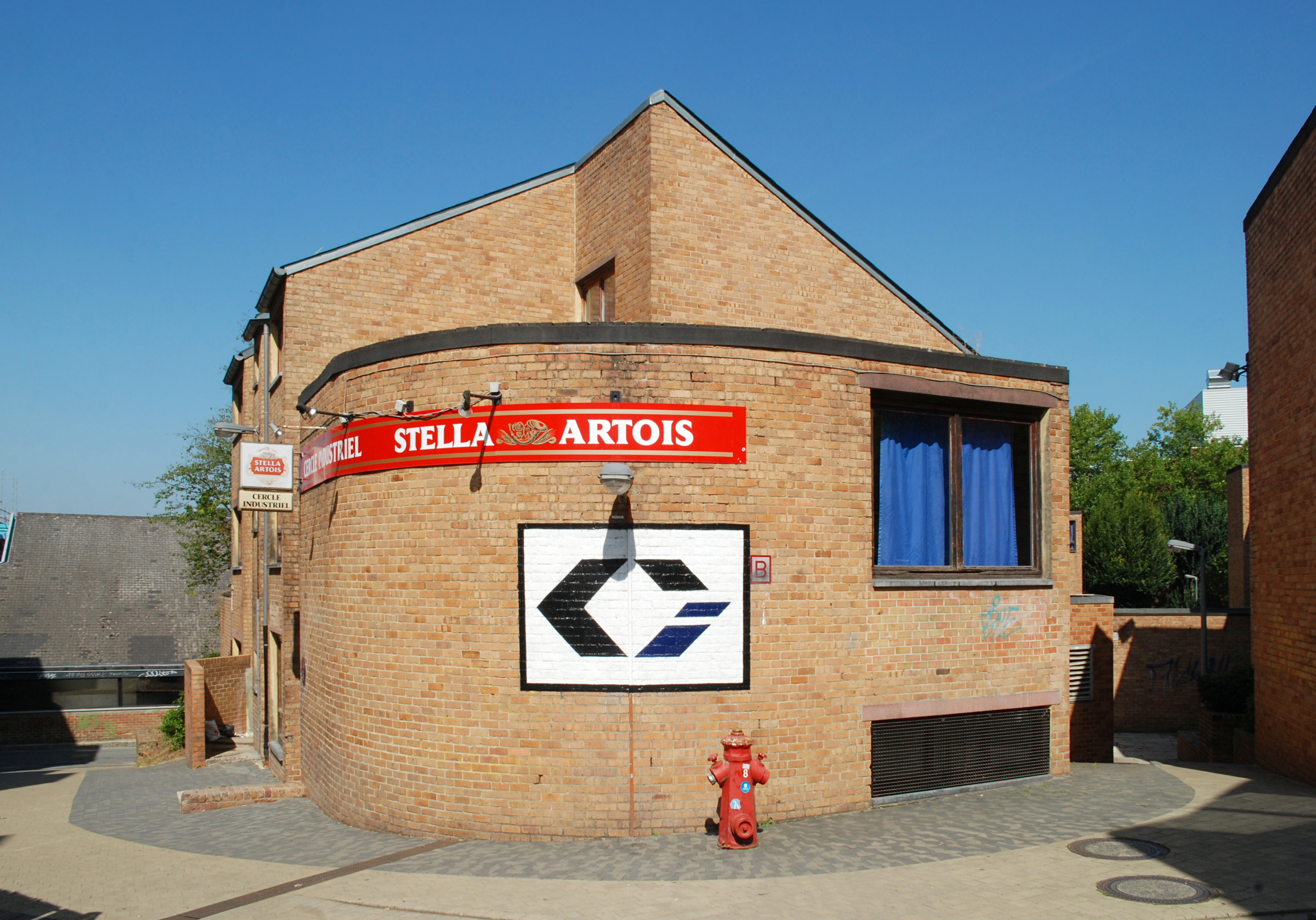 Belgique - Louvain-la-Neuve - Cercle industriel (cercle des étudiants ingénieurs)